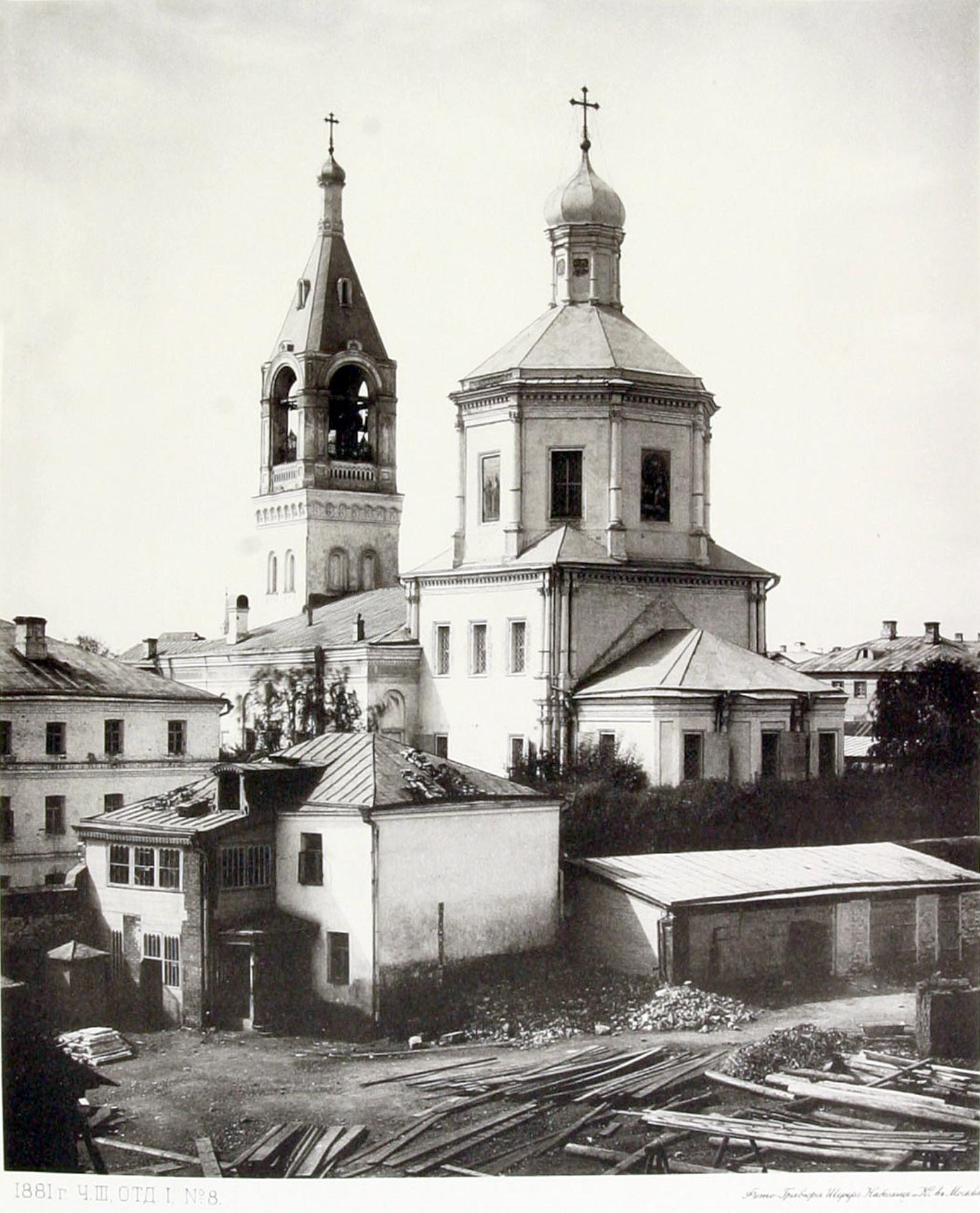 Храм Илии Пророка (Илии Обыденного) в Обыденском переулке